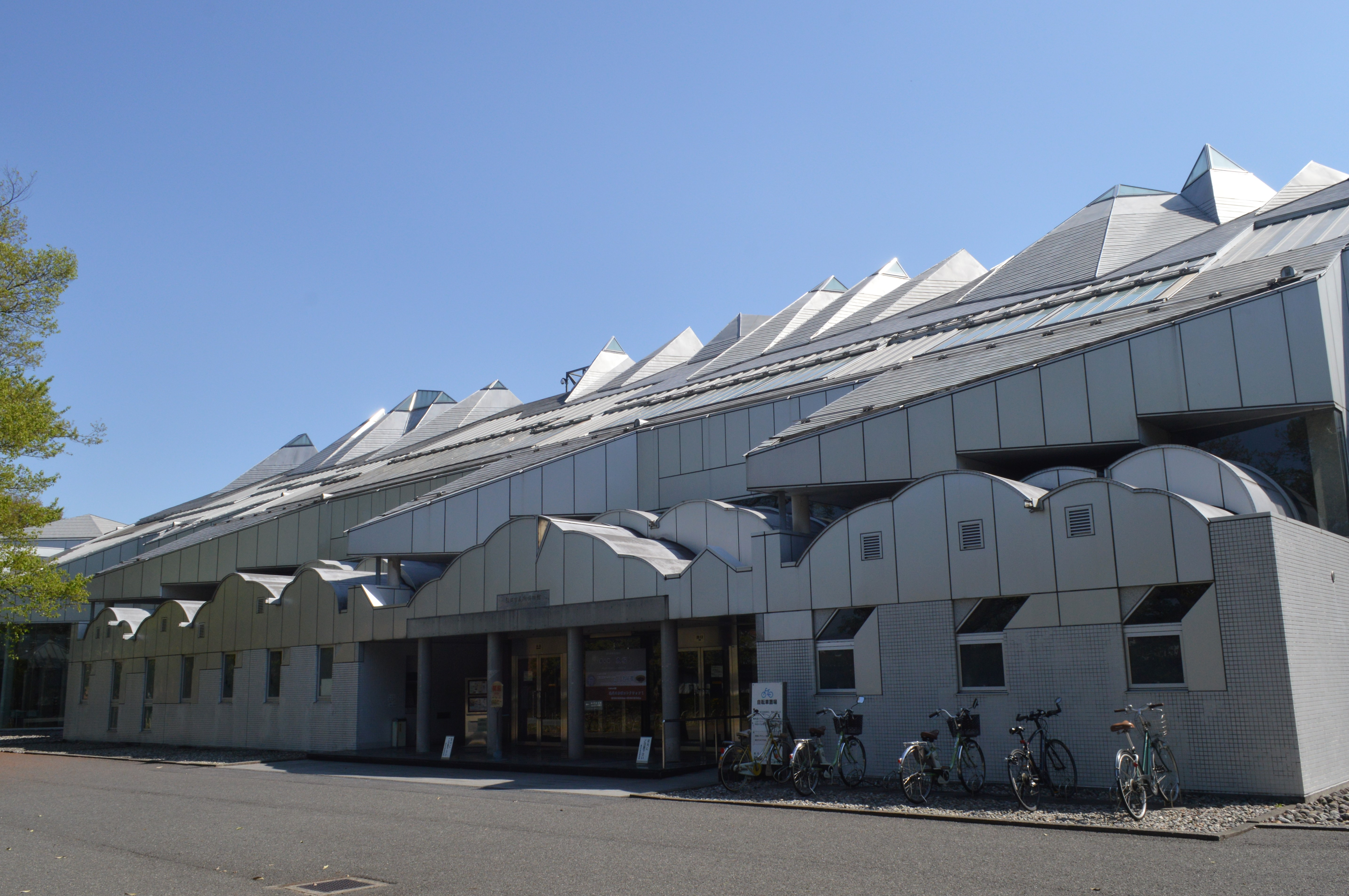 長野県飯田市の飯田市美術博物館。